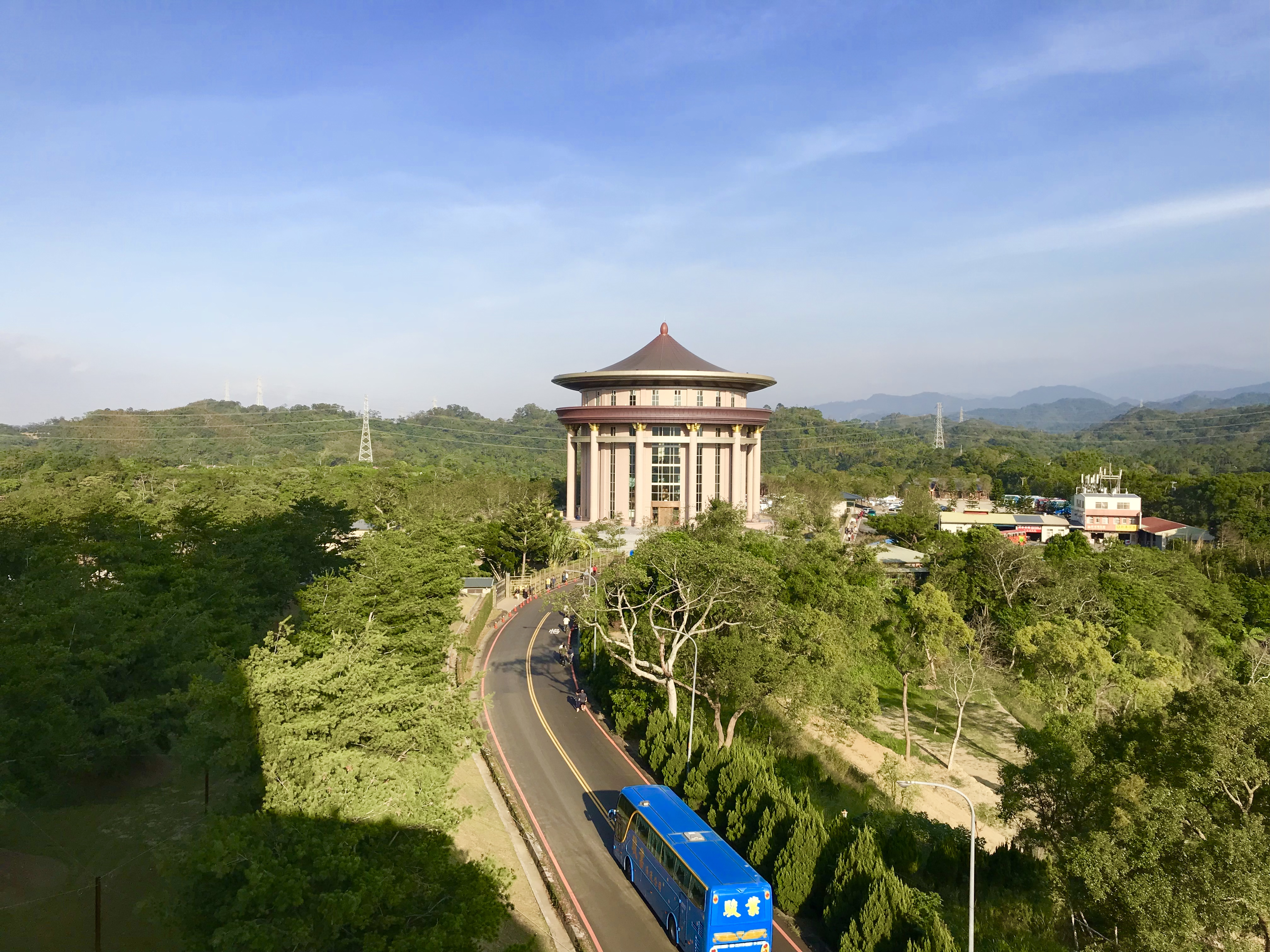 中文（台灣）: 天恩彌勒佛彌勒殿